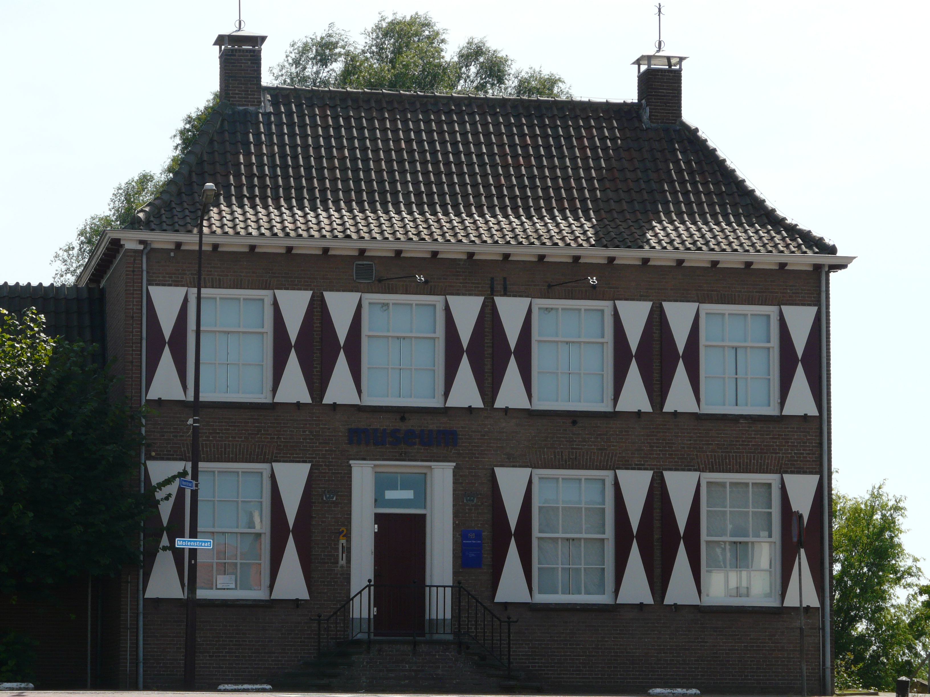 Zicht op een deel van het voormalige Museum en galerie Van Lien in Fijnaart